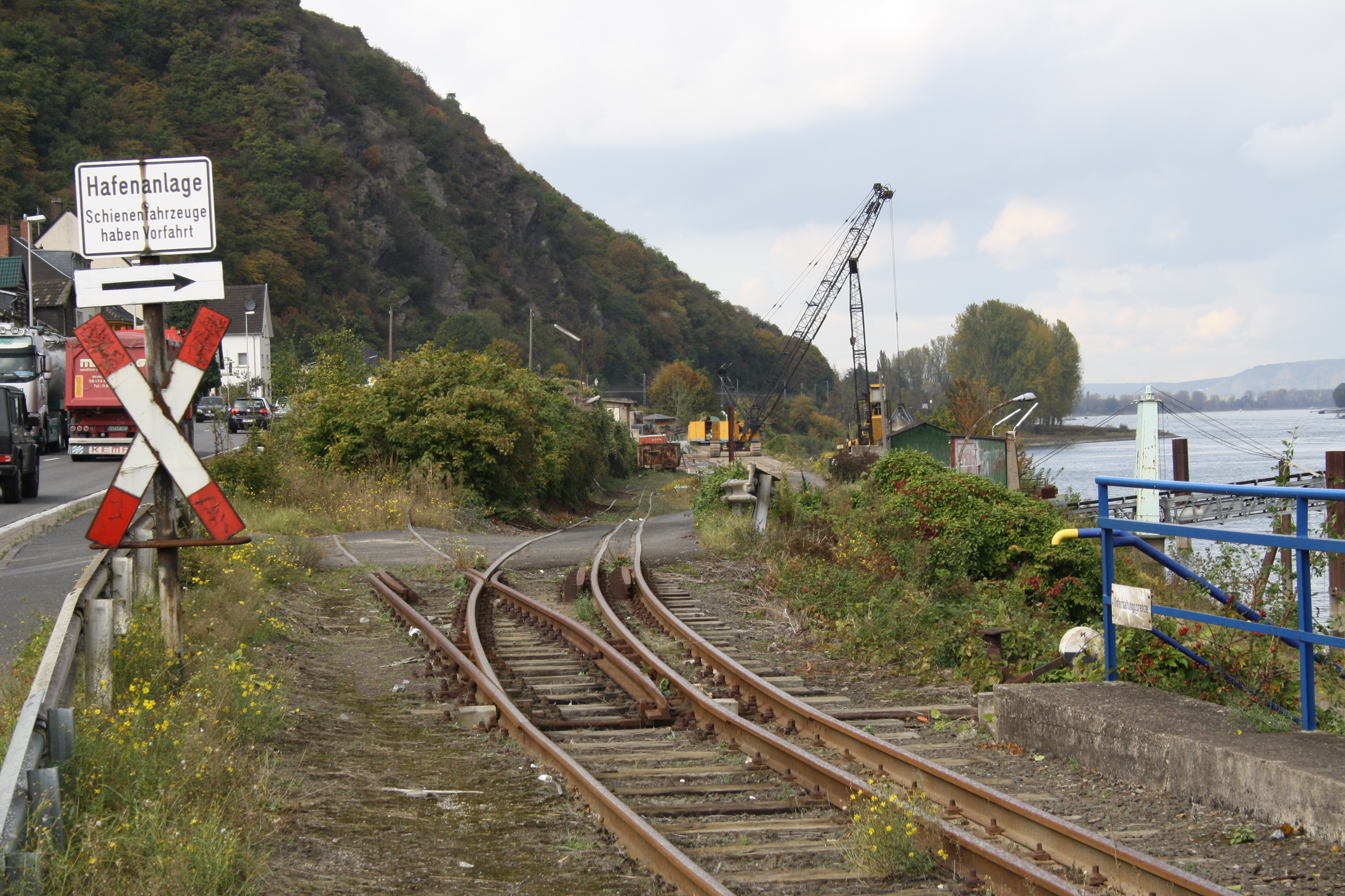 Hafenbahnhof Brohl